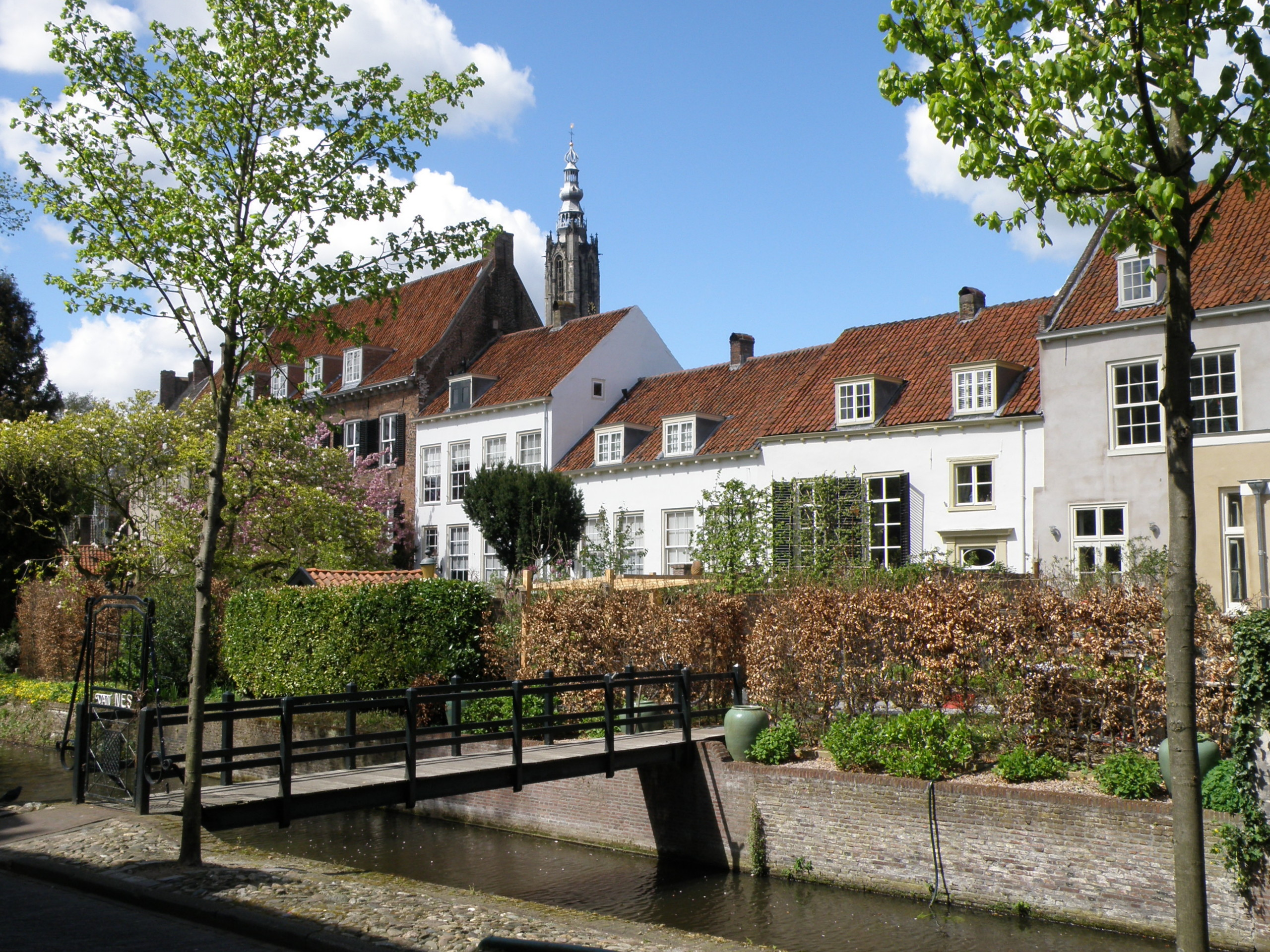 Amersfoort (prov. Utrecht, Nederland). Achtergevel van enige muurhuizen gezien vanop de Zuidsingel, van links naar rechts: Muurhuizen nr.9 (hoog uitstekend, baksteen); Muurhuizen nr.11 (wat lager, wit pleister); Muurhuizen nr.13 (lag, wit pleister); Muurhuizen nr.15 (idem); en Muurhuizen nr.17 (hoger, grijze bepleistering).